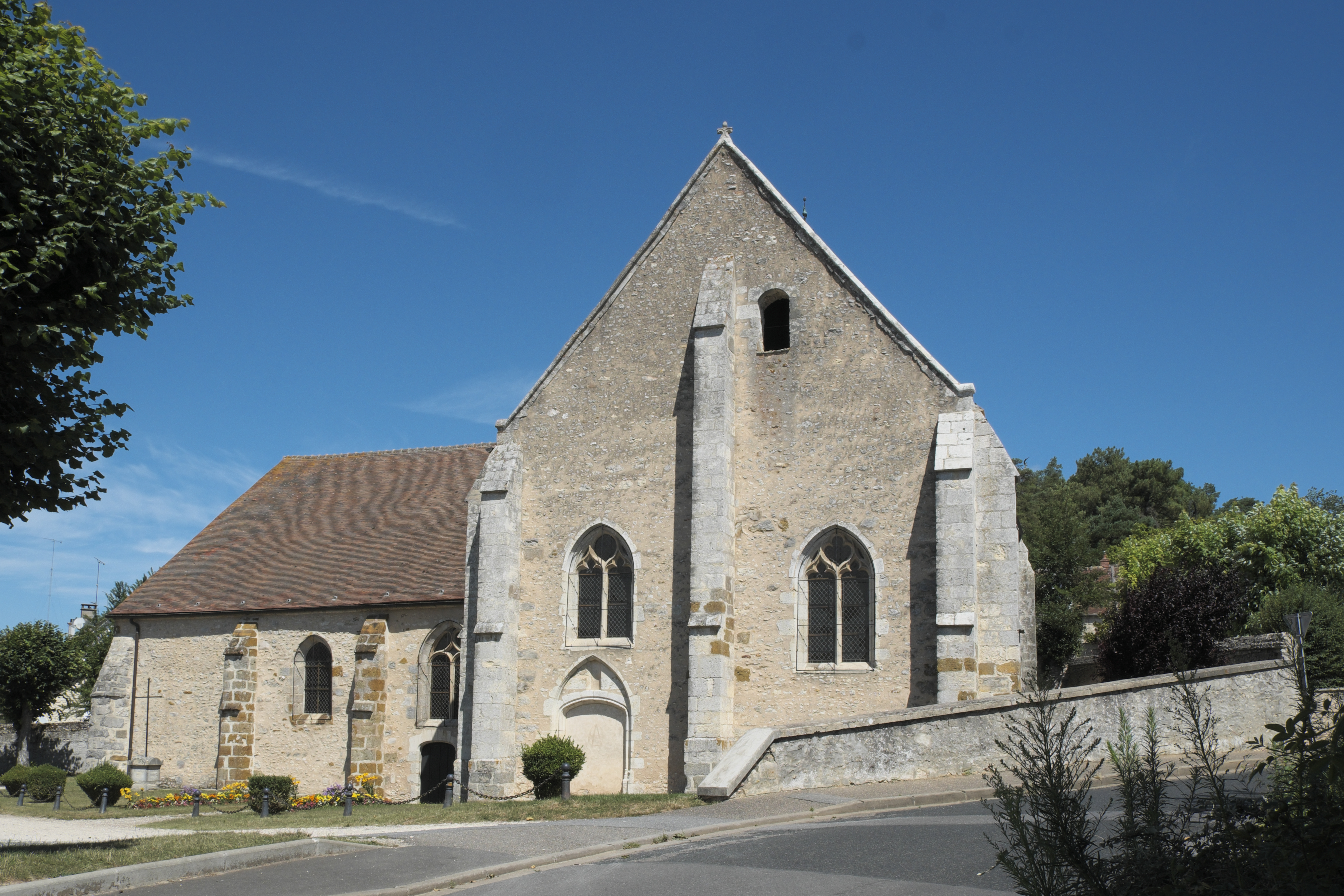 Katholische Pfarrkirche Saint-Quentin in Brières-les-Scellés im Département Essonne (Île-de-France/Frankreich)